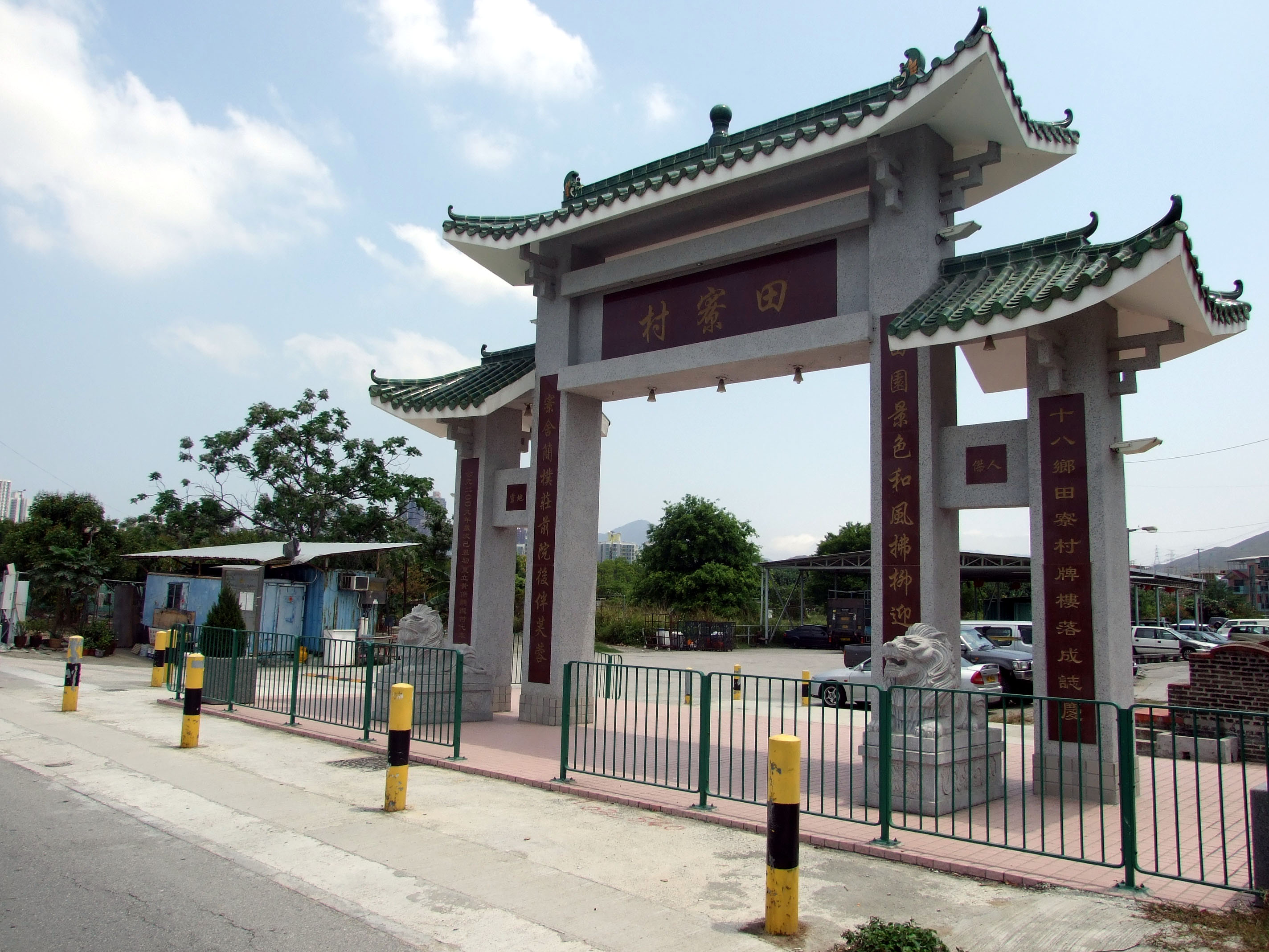 中文（香港）: 田寮村牌樓